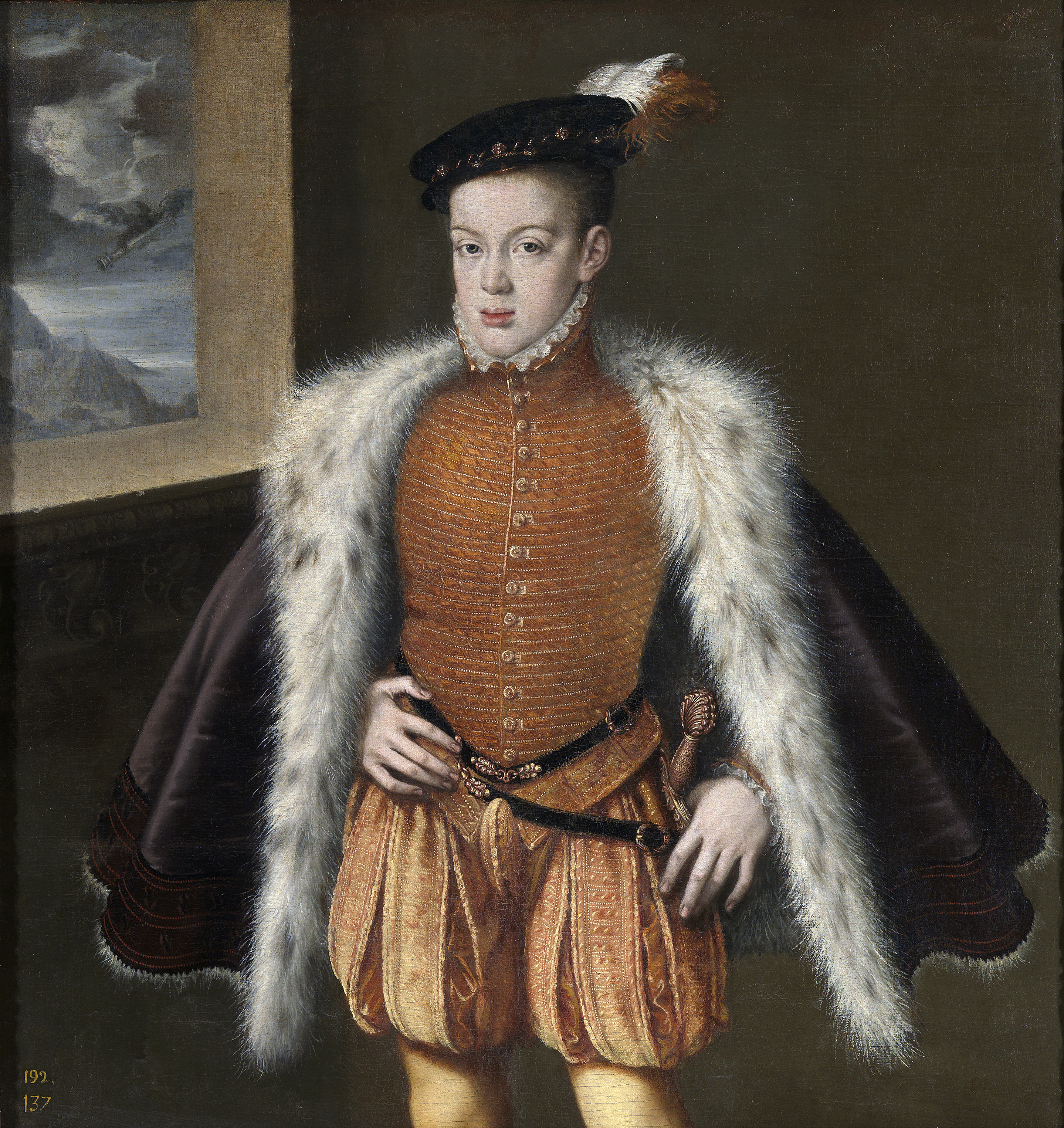 Retrato del príncipe de Asturias Carlos de Austria, que fue el hijo primogénito del rey Felipe II de España y de la reina María Manuela de Portugal, primera esposa de Felipe II.